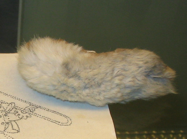 Begleittext: Pikierte Schablone (Sponse) [...] und Hasenpfote zum Durchpausen der Umrisslinien. Hetjens Museum - Deutsches Keramikmuseum, Düsseldorf.